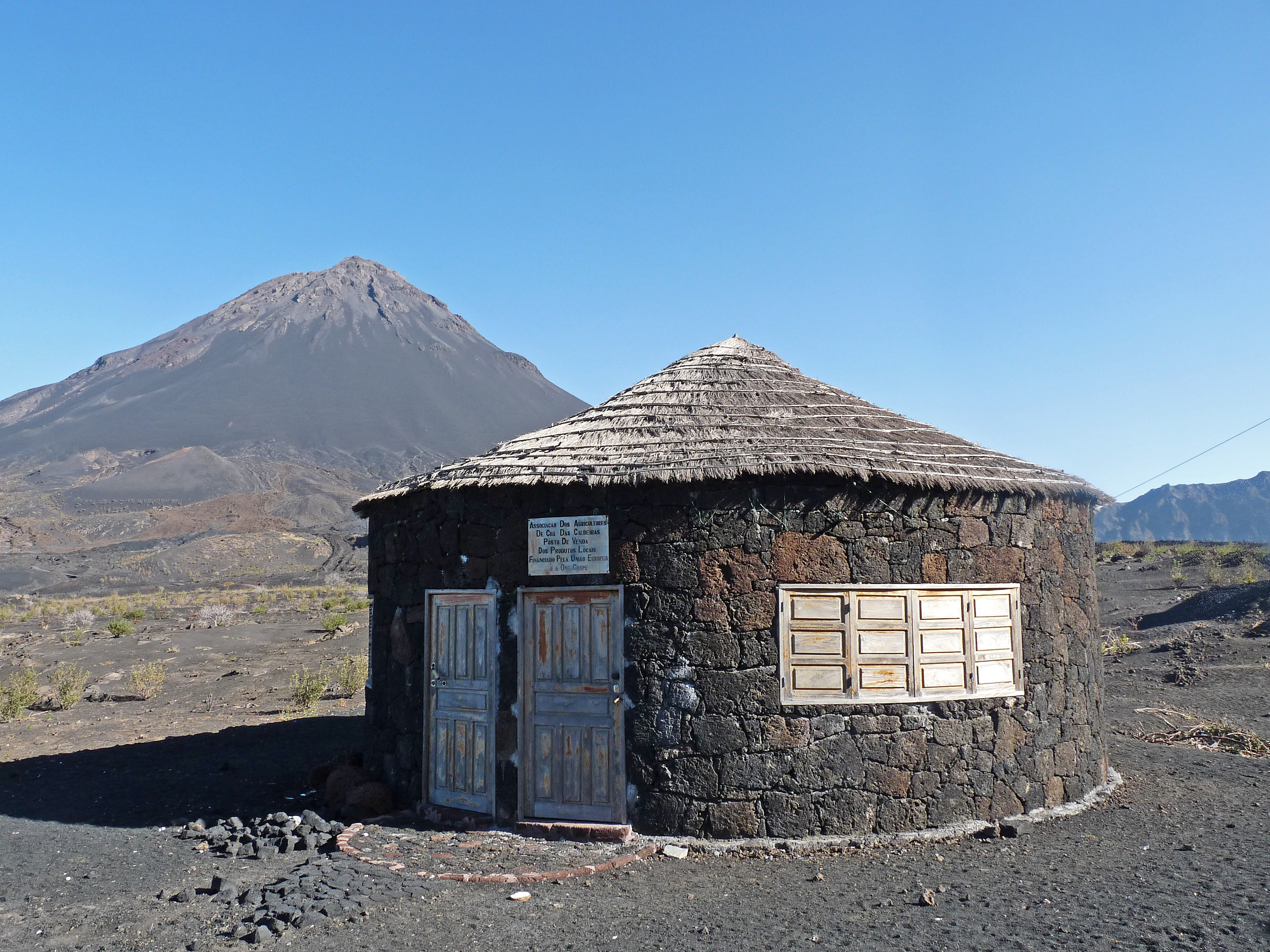 Chã das Caldeiras (île de Fogo, Cap-Vert) : maison traditionnelle en pierre volcanique et toit de chaume